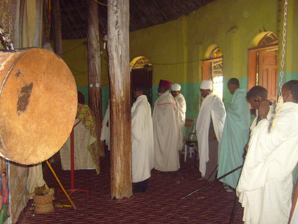 Ethiopia Tana Lake. a Monastery